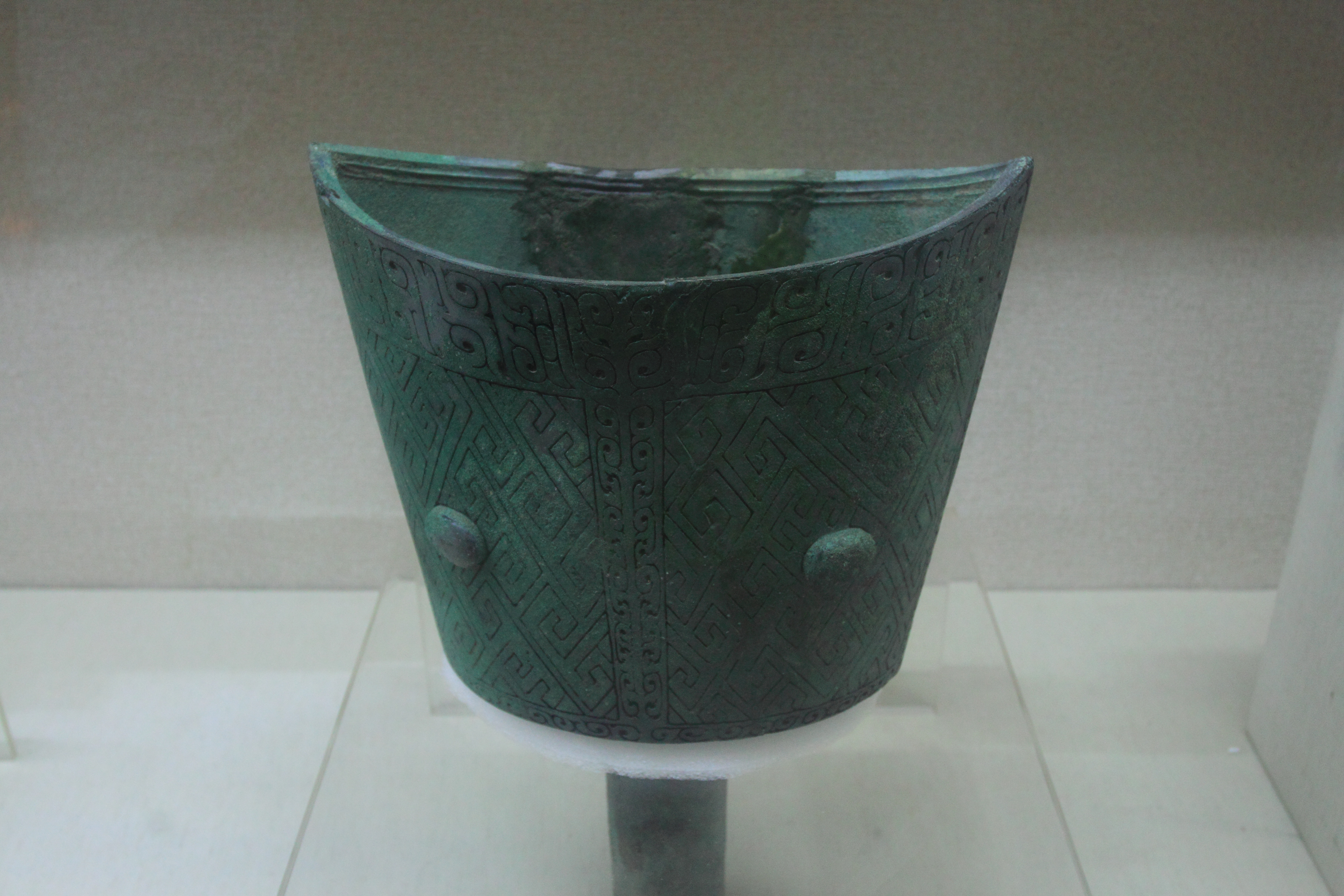 江西省博物馆（位于中国江西省南昌市）藏品——勾连雷纹青铜铙，商代，1989年新干县大洋洲出土。